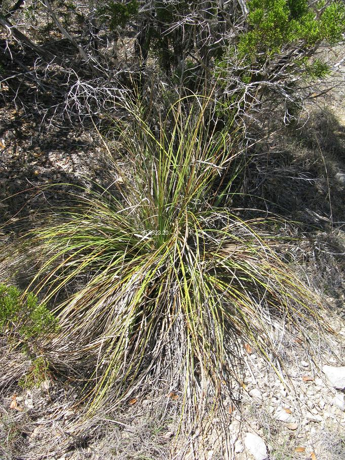 Nolina lindheimeriana in Zentral-Texas